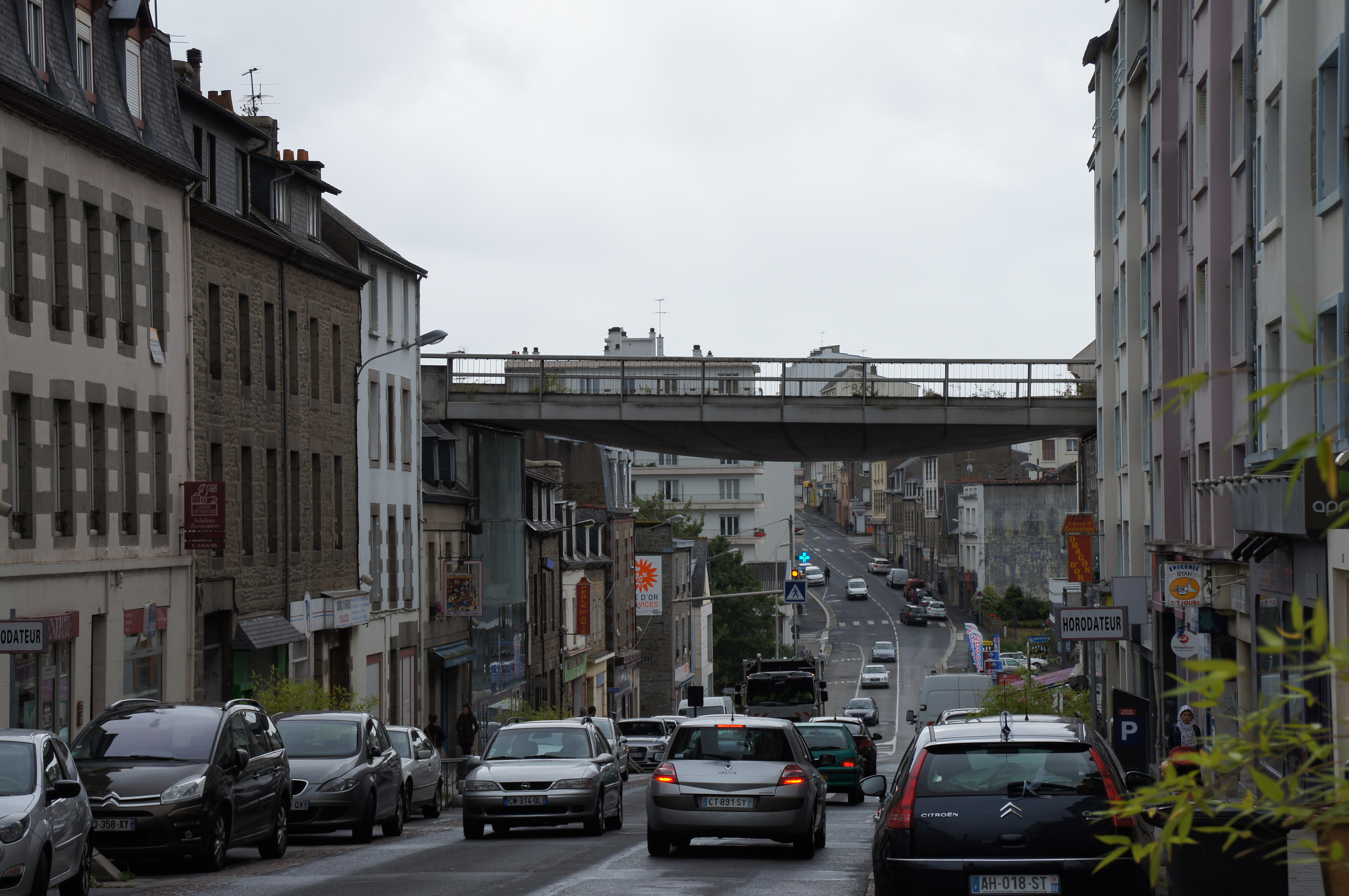 Strassenbrücke Waldeck-Rousseau, die 1997 die frühere Schamspurbahnbrücke Pont de Gouëdic ersetzte